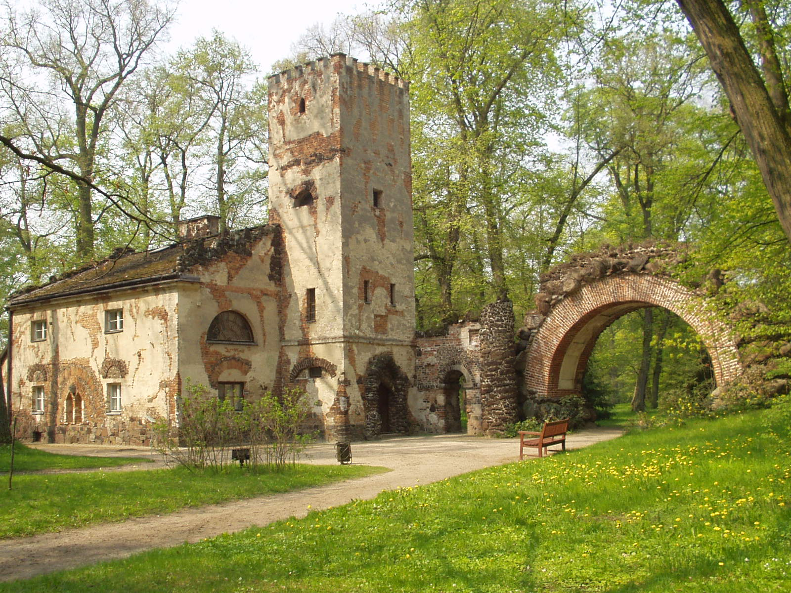 Dom Murgrabiego i Łuk Grecki w Arkadii